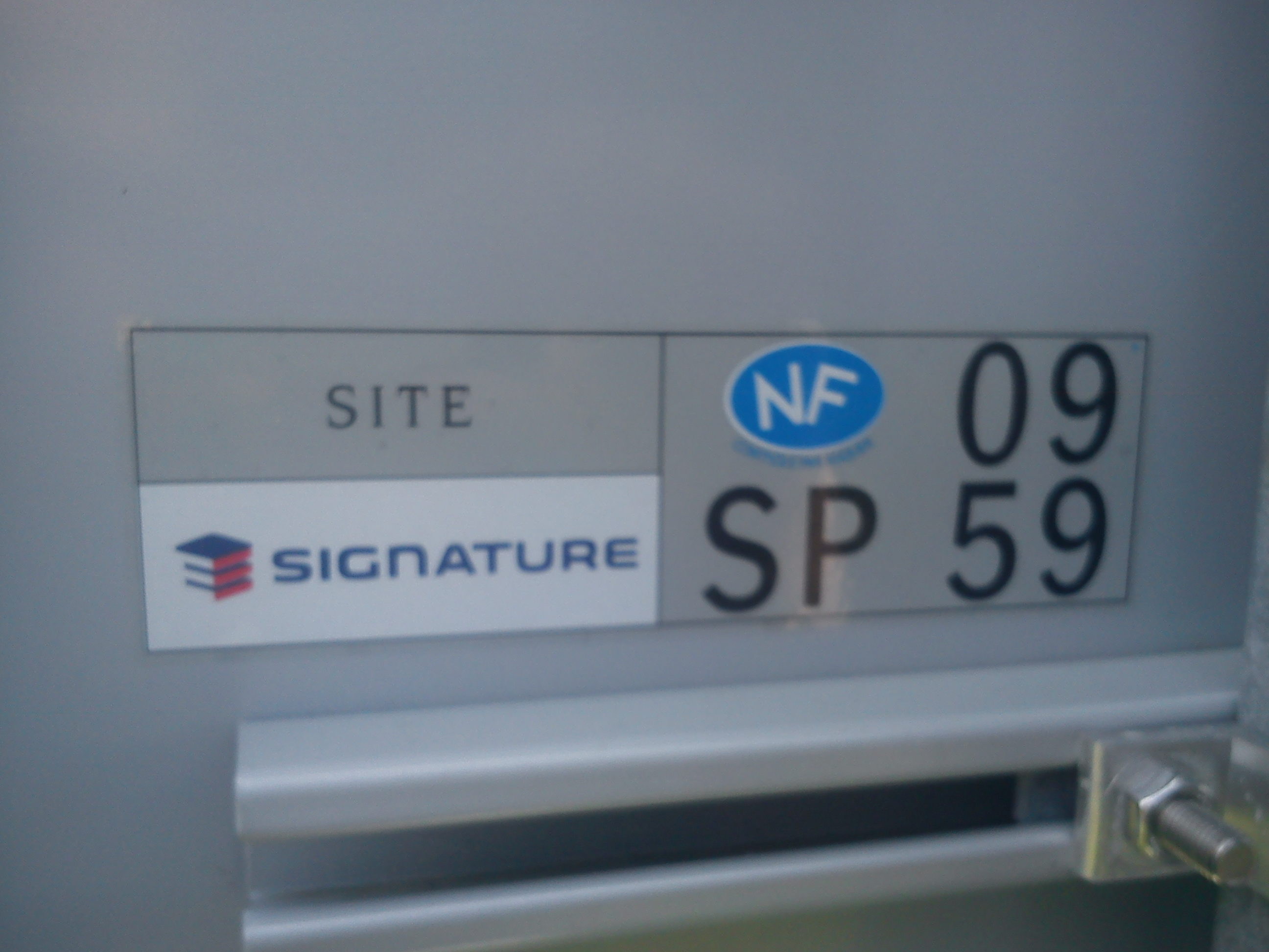 Étiquette à l'arrière d'un panneau de signalisation portant la mention: NF SP 09 59.